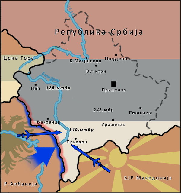 Уопштени приказ Операције Стрела за инфо кутијицу